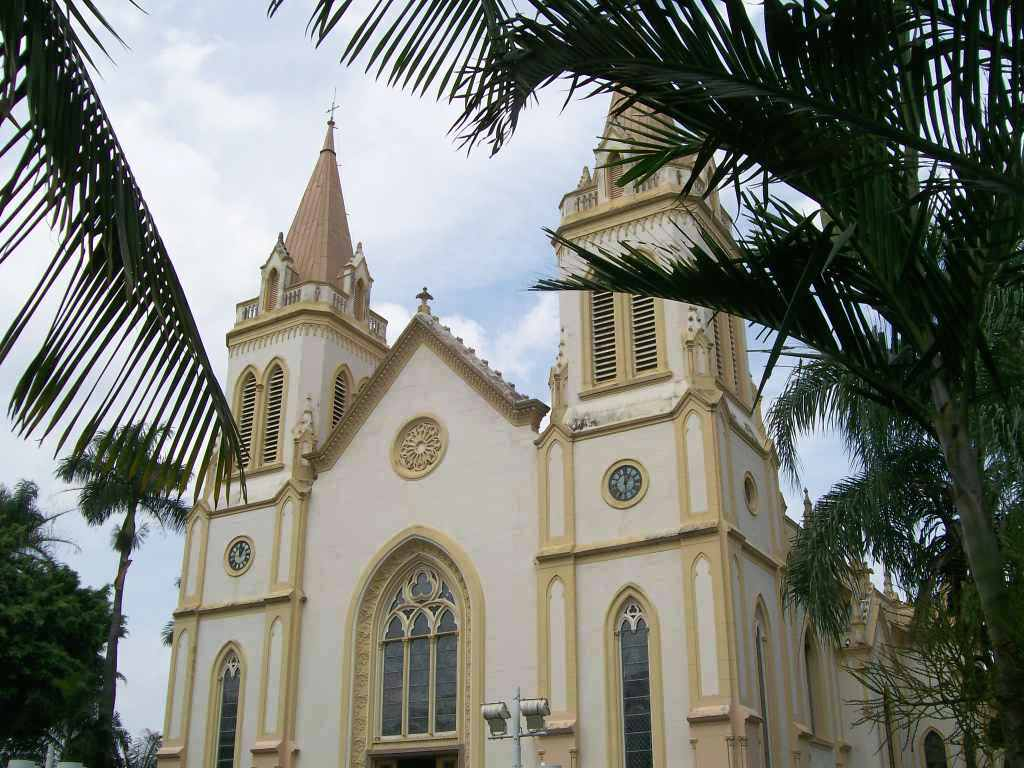 Catedral Nossa Senhora do Desterro em Jundiaí/SP. Fica na Praça Gov. Pedro de Toledo. Marco zero do início de Jundiaí. Comemora a padroeira em 15 de agosto.